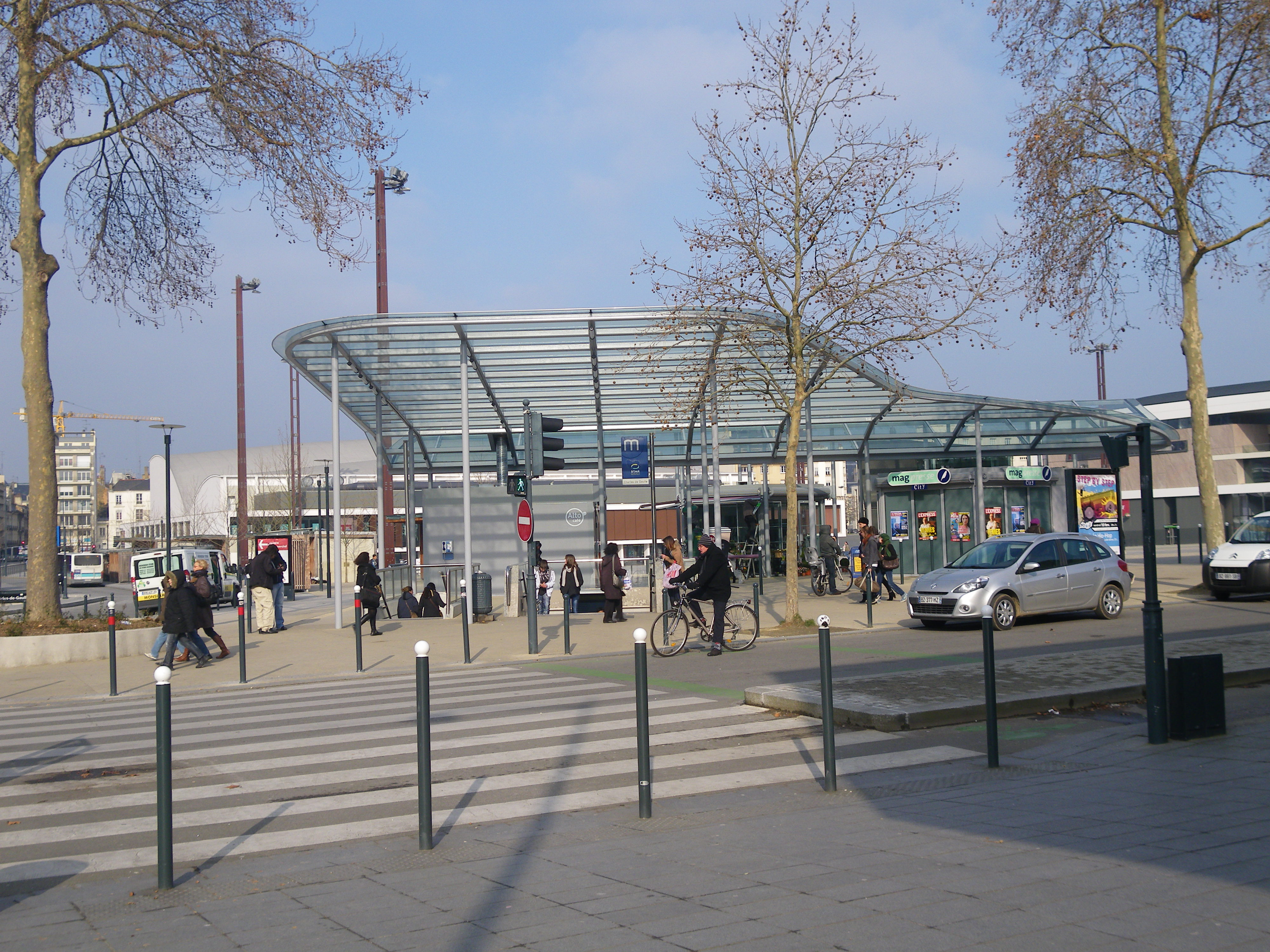 la station de metro Charles De Gaulle a rennes